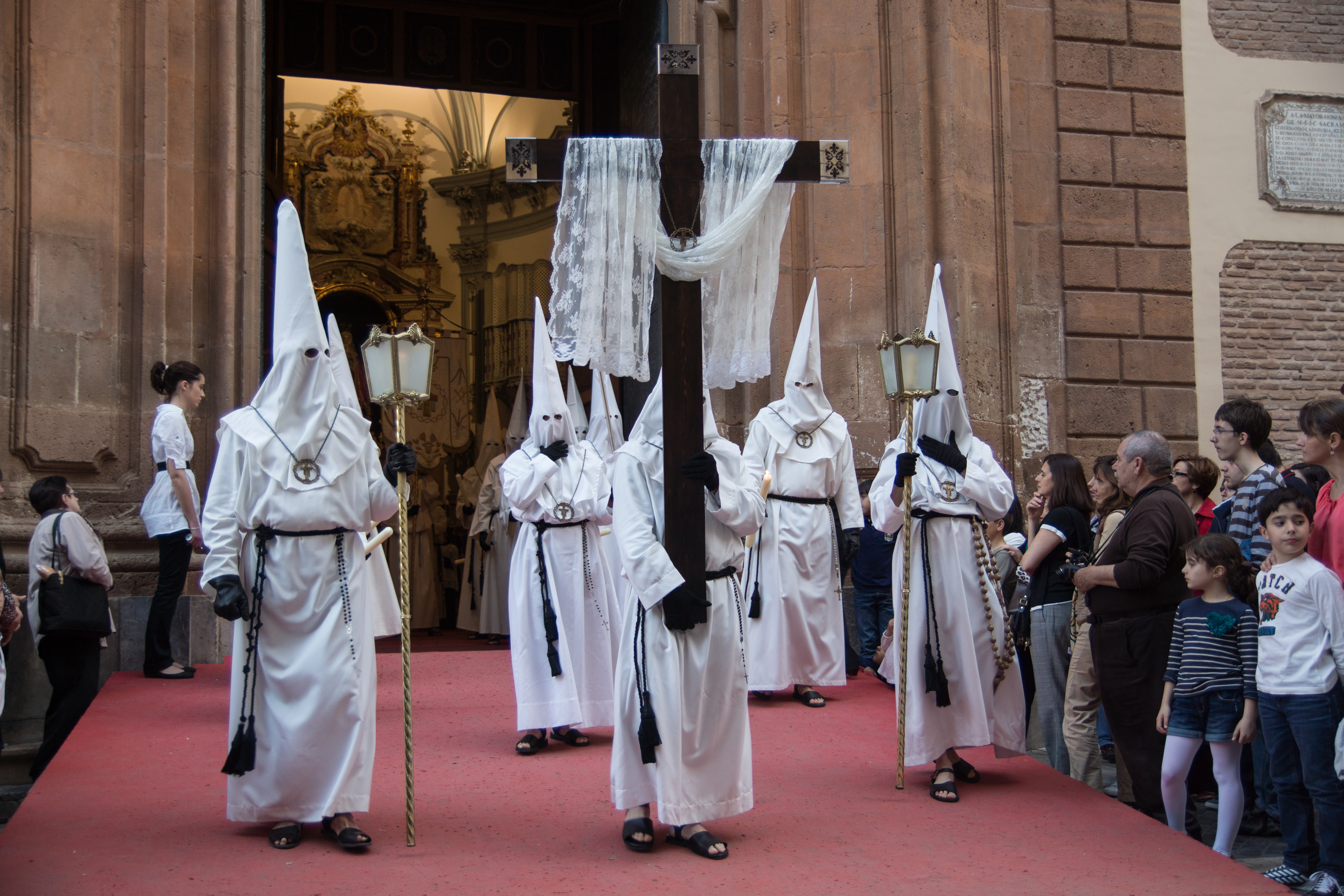 Cofradía del Yacente. Nazarenos saliendo de San Juan de Dios. This is a photography of a Folklore festival in Spain (Wikidata id Q5685566).